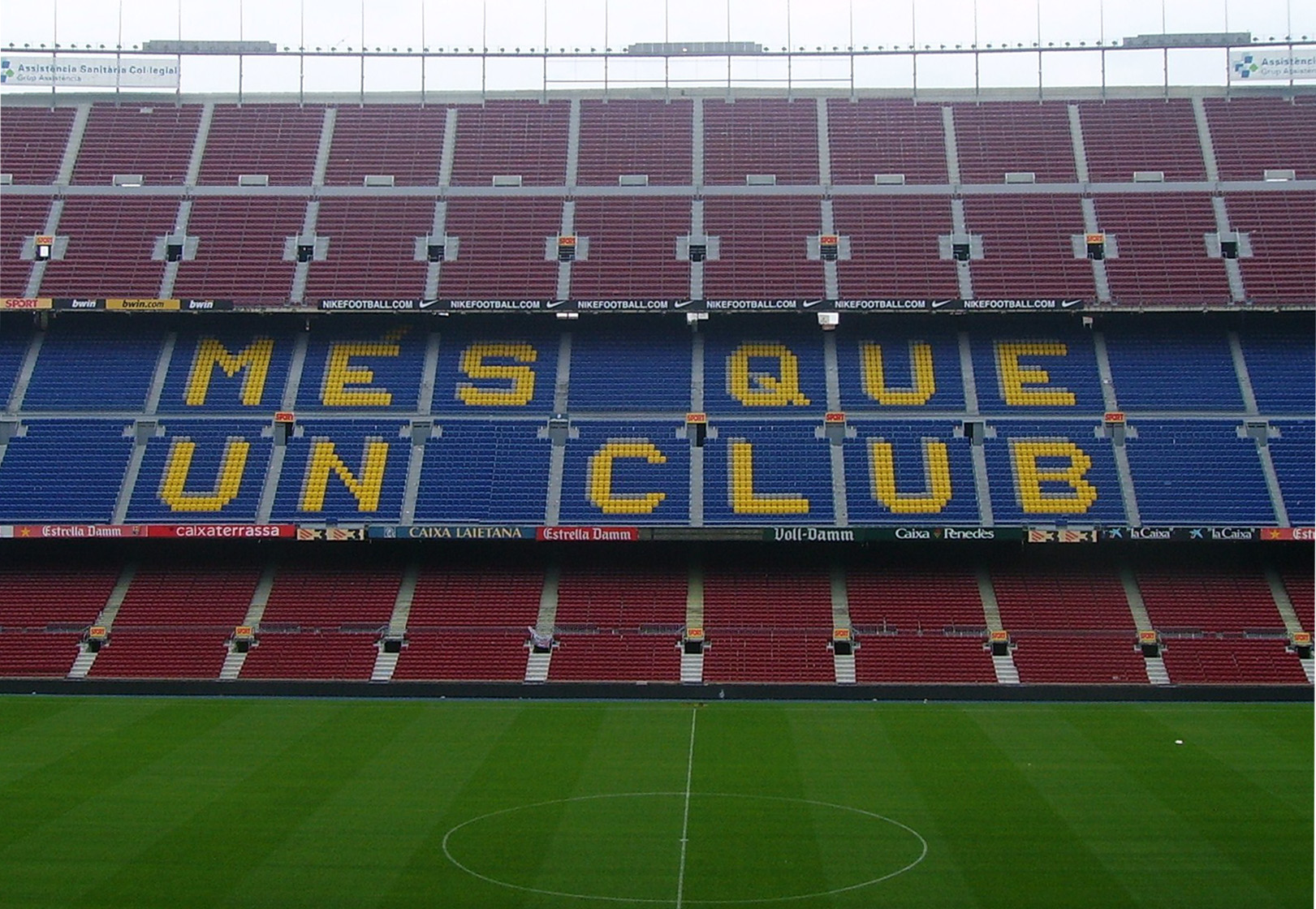 La scritta Barça Més que un Club, motto del FC Barcelona, sulle gradinate Barça estadio del Camp Rock